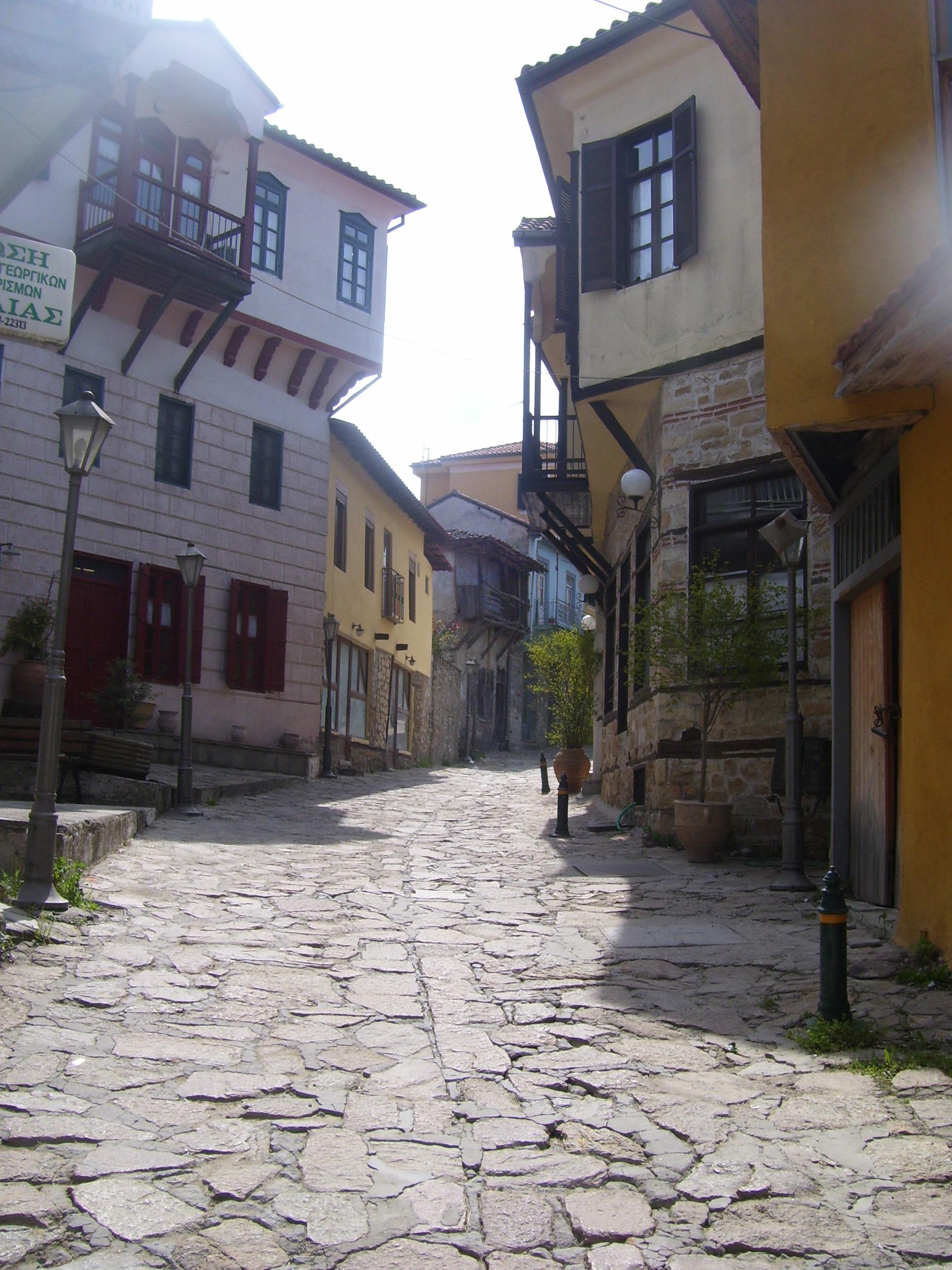 Улица в Арнеа (Леригово).